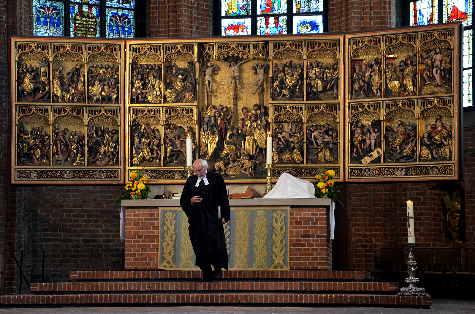 Pastor Wolfgang Puschmann, Stadtsuperintendend a.D. und ehemals erster Pfarrer an der Marktkirche von Hannover, hier während eines Gottesdienstes mit anschließendem Heiligen Abendmahl, an der Orgel begleitet durch den Organisten Ulfert Smidt ...